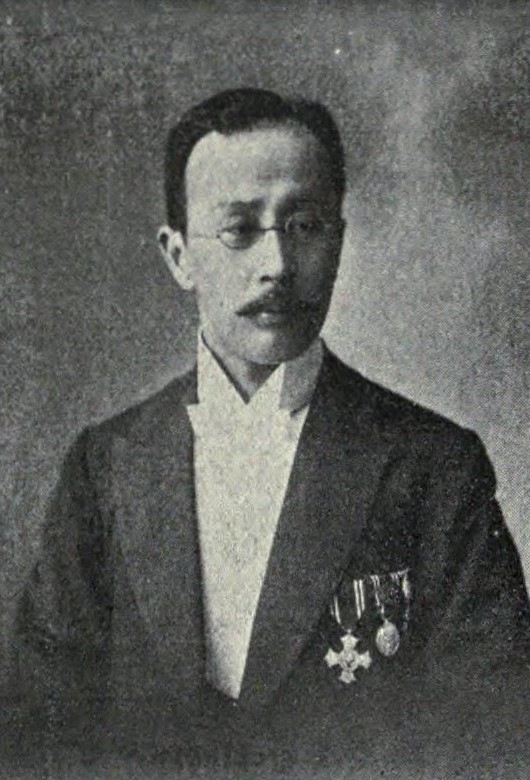 大村彦太郎 十代義全 和吉郞 先代亡大村彦太郞の長男にして明治二年三月二十六日を以て生る同二十年英國に渡航しチエルテナム中學に入りて語學を修め尚ほ織物製造業者に就きて商業を習得す在英中は主として輸出入直接取引の方法を究め英國及ひ佛獨の各國に取引先を求め在留八年にして同二十八年五月歸朝し同年十月家督を相續し前名和吉郞を改めて先代の名を襲き大村家十代の當主となる屋號を白木屋と云ひ今を去ること三百年以前の創業にして連綿以て今日に至る曾て日本織物株式會社の創立に盡瘁し推されて其頭取となり又東京銀行監査役たりき現時直接國税二萬四千八百餘圓を納め東京商業會議所議員たり 母 ひて 天保一四、一生、京都、平、亡三井八郞次郞十二女 妻 ダイ 明三、一生、男爵鴻池善右衛門妹 男 彦一郞 明三一、五生 女 當子 明三三、一一生 二男武雄（明三二、八生）二女文子（同三五、四生）三男和之助（同三九、一二生）四女コズヱ（同四一、三生）あり 妹きく（同三、九生）は京都府平民中田彦三郞に嫁せり